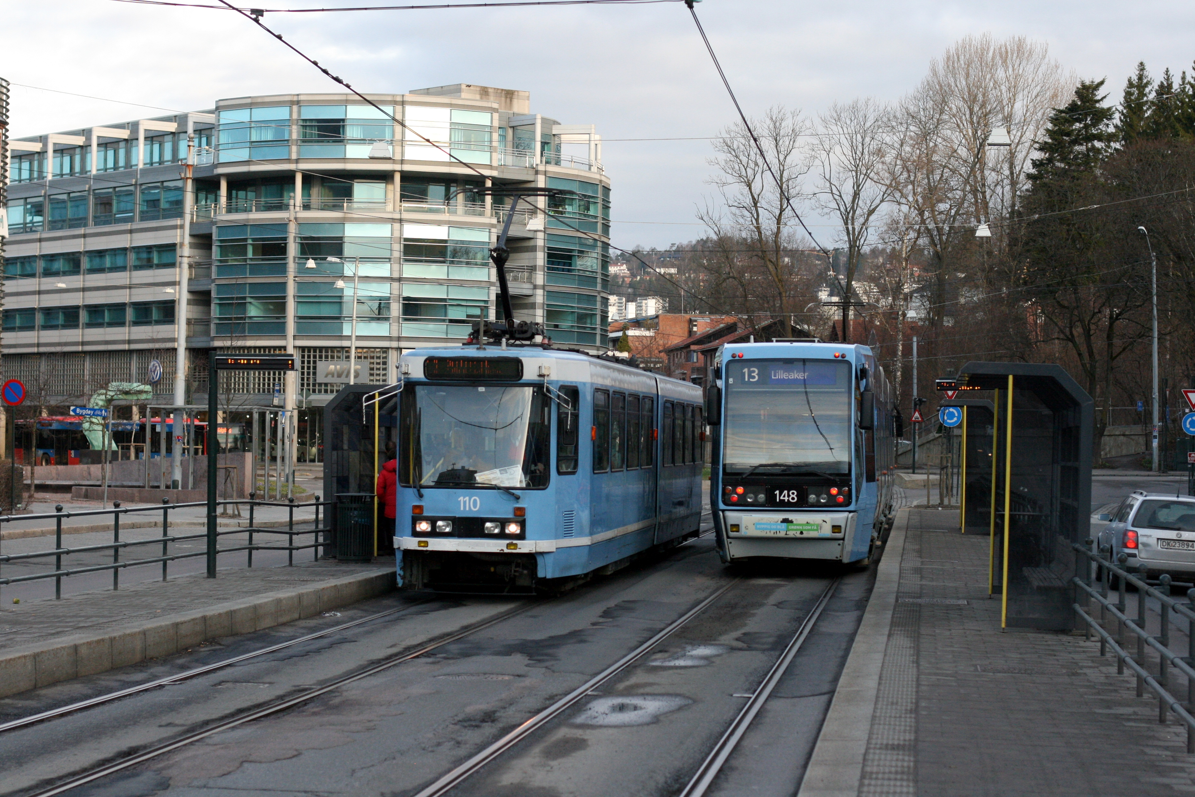 Trikkestoppet Thune i Drammensveien i Oslo.